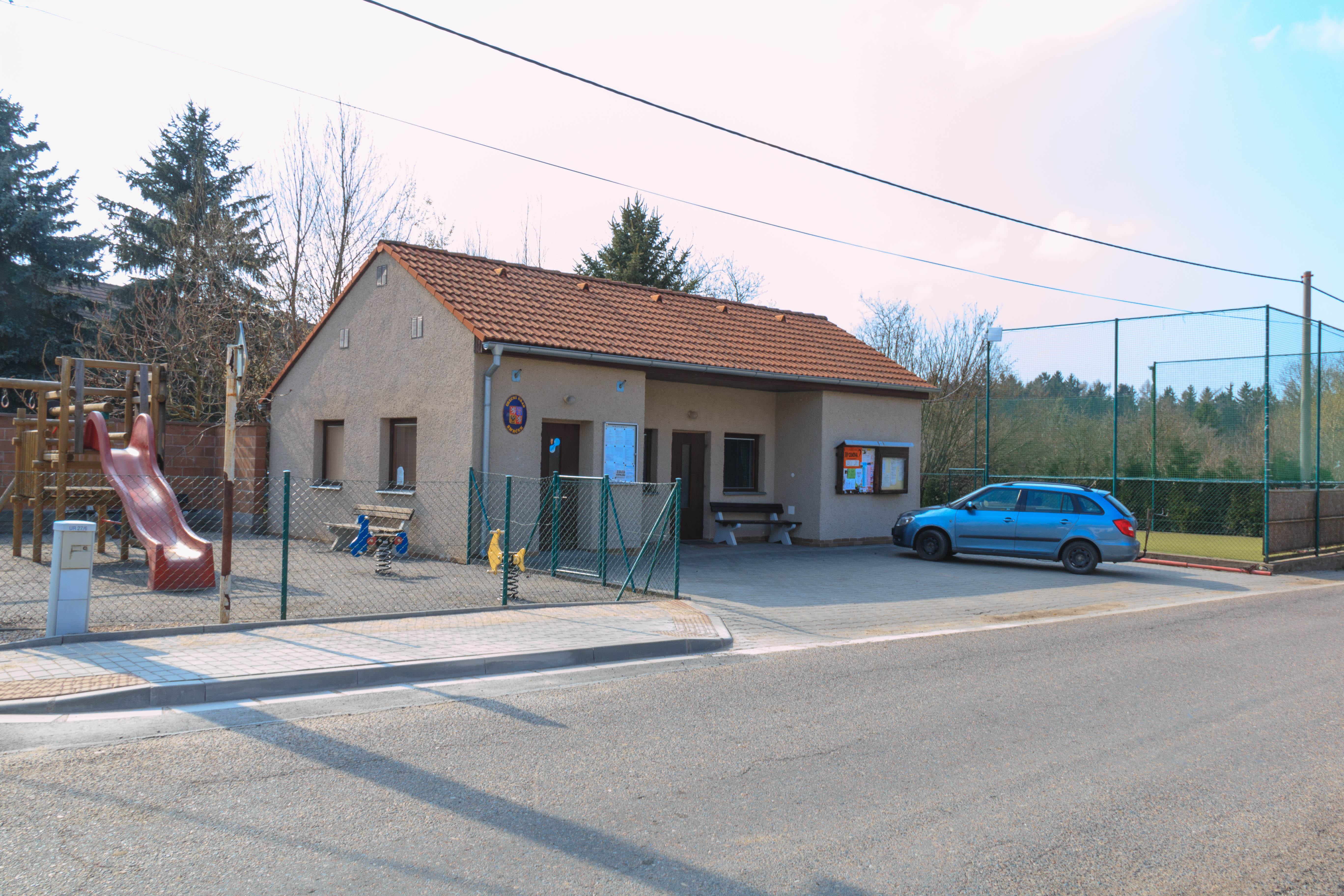 Smrček obecní úřad